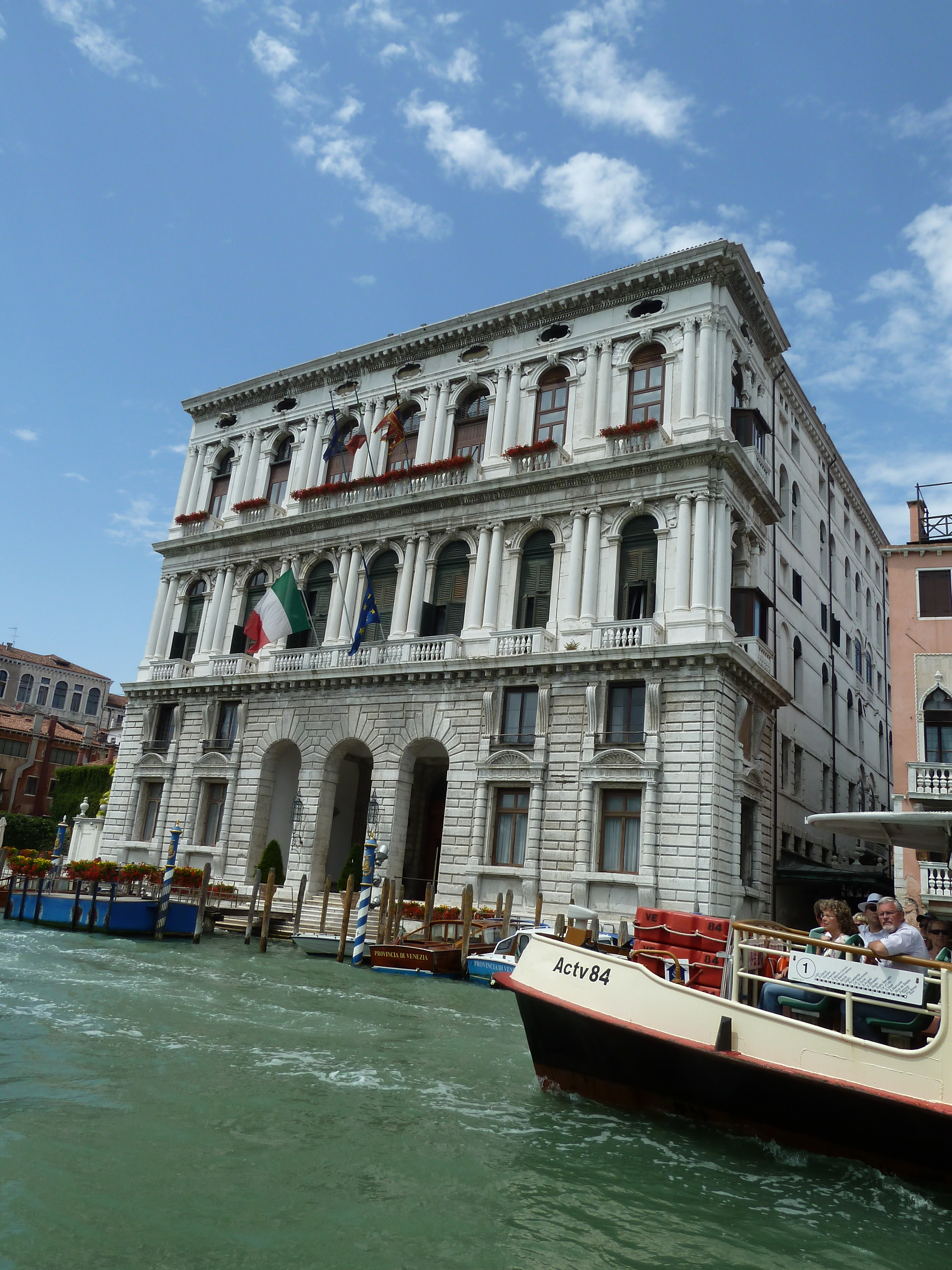 Palazzo Corner della Ca' Granda